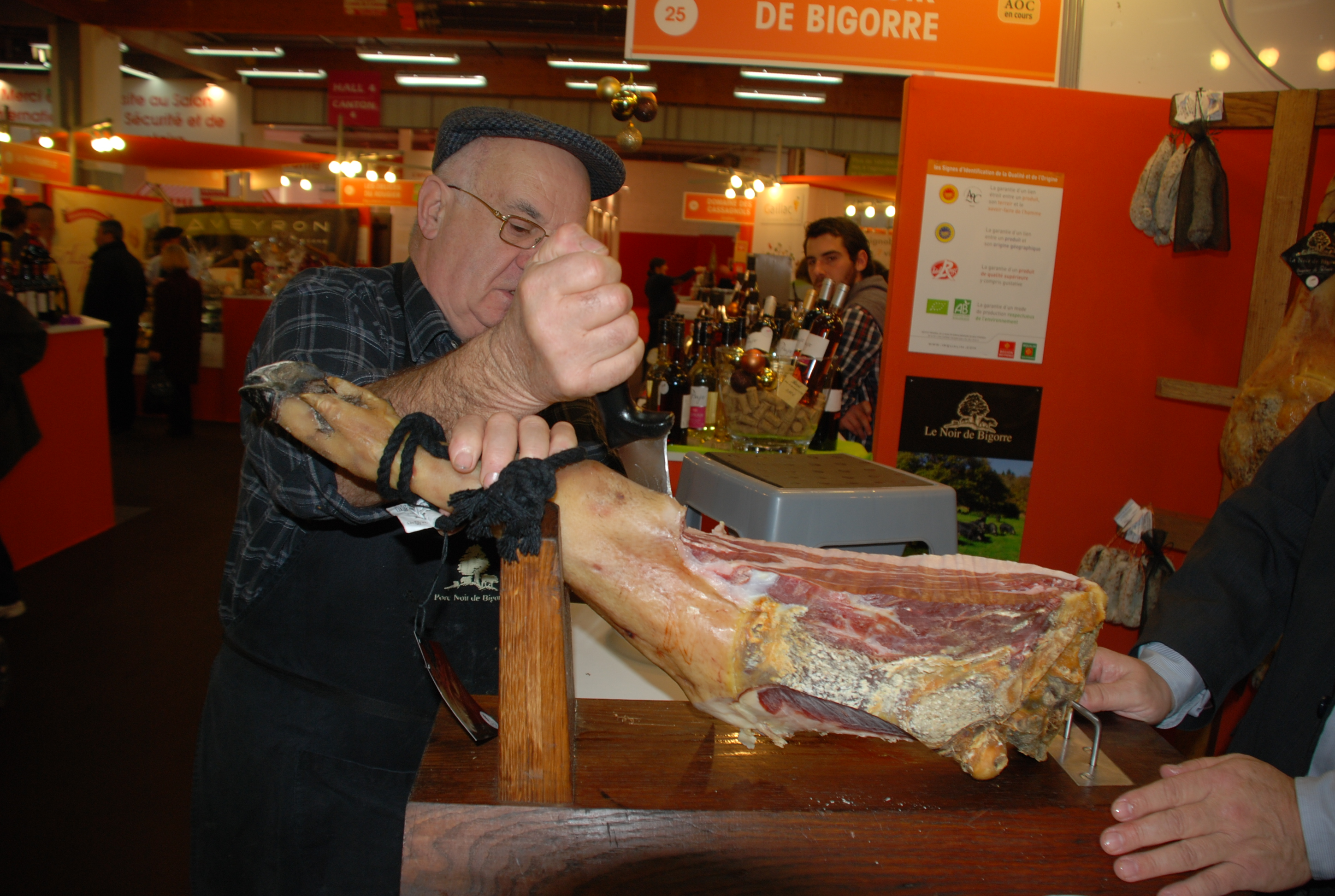 Stand du Noir de Bigorre SISQA 2013 :Jean Dupont, ancien charcutier-traiteur de Soues (Hautes-Pyrénées) animateur des stands du Noir de Bigorre